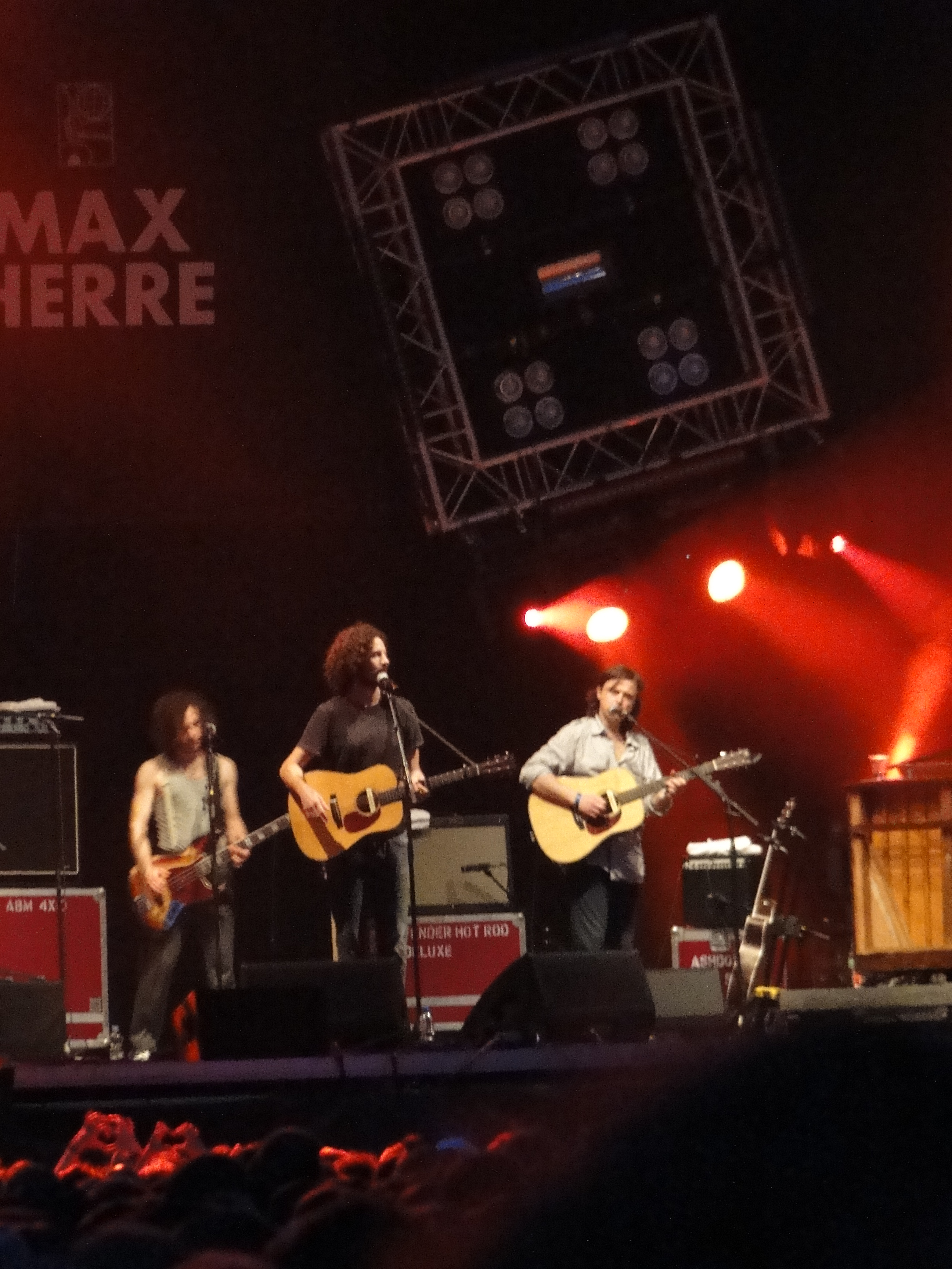 Max Herre und Band bei der Rheinkultur 2010.